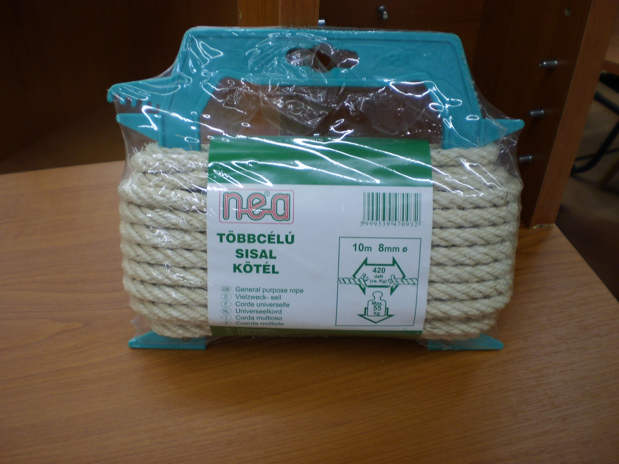 Sisal kötél